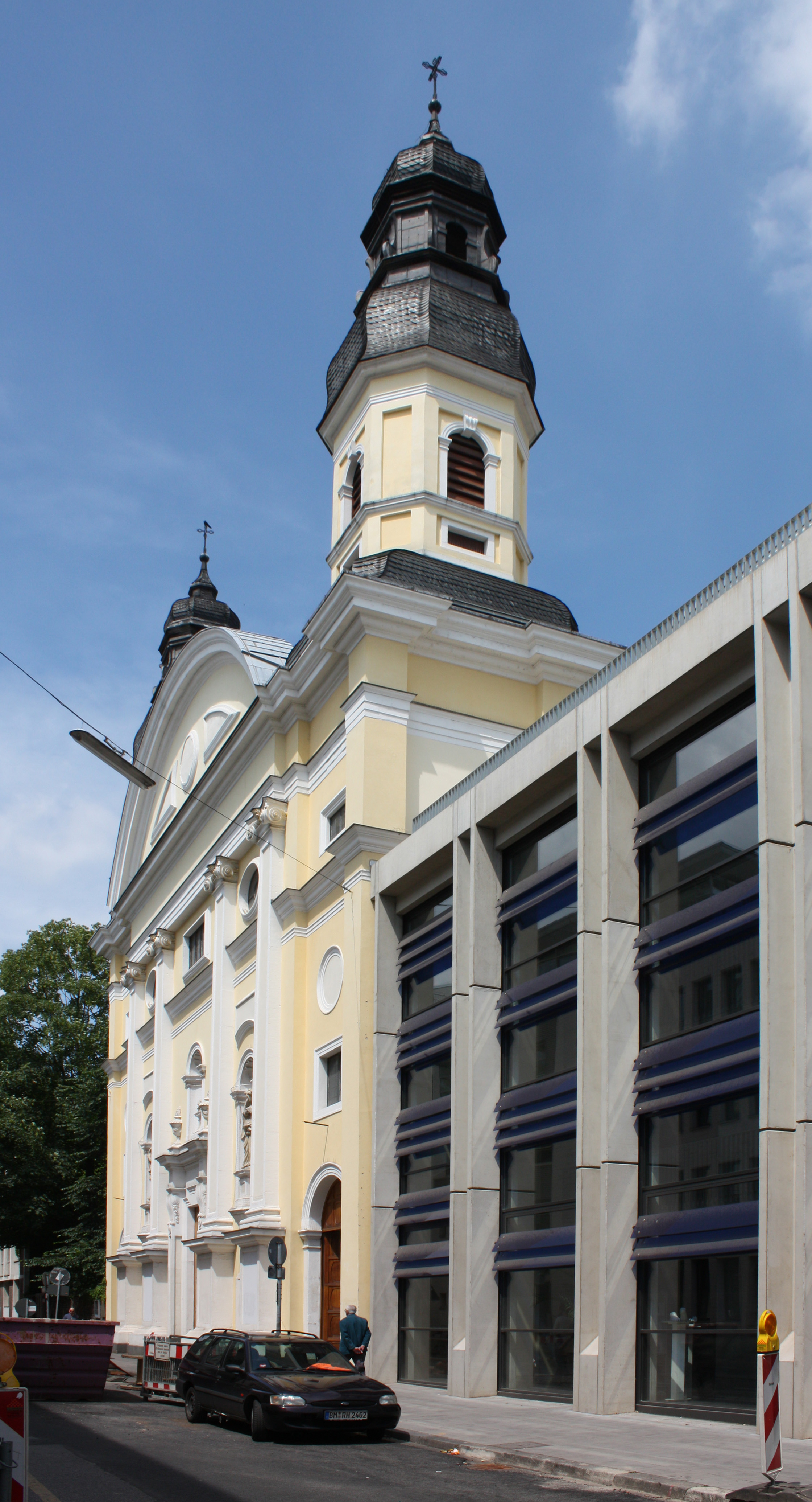 Köln, Ursulinenkirche St. Corpus Christi